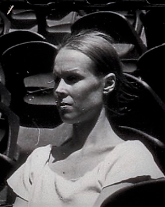 Photographie de Fernand Michaud. "Etoiles familières d'Avignon". Festival d'Avignon 1976.